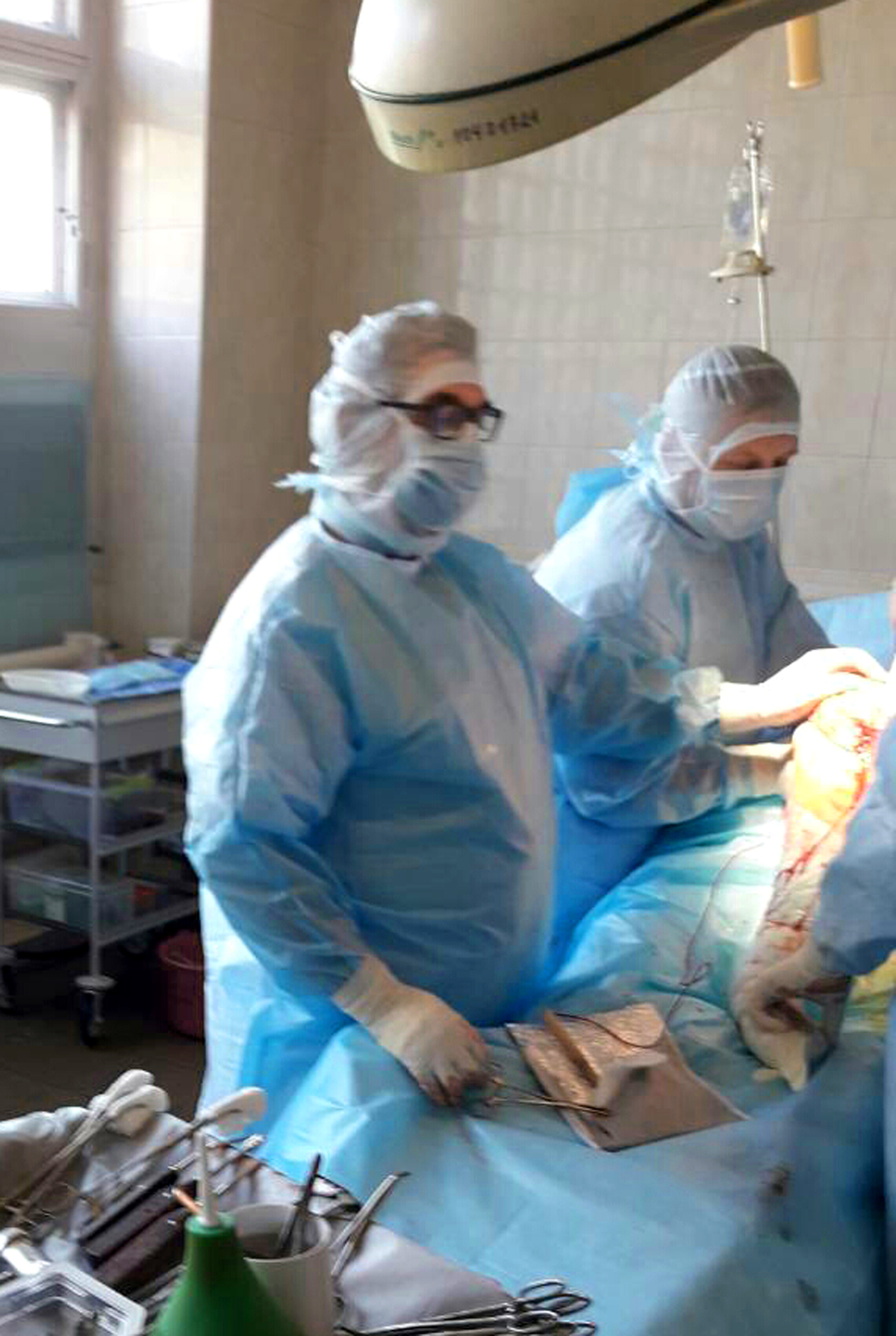 Павлішен Юрій Іванович на операції_2